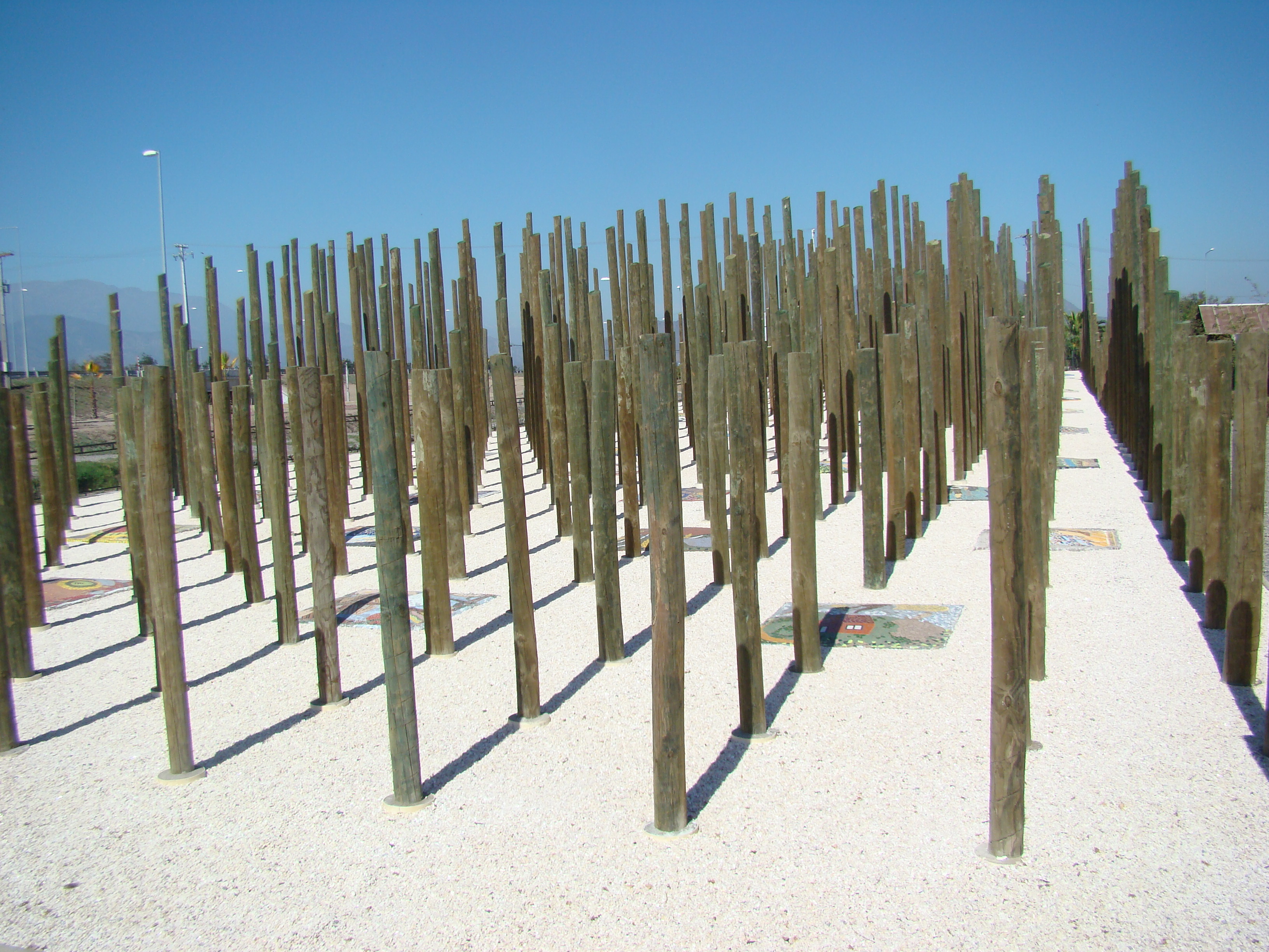 Memorial conmemorativo de la violación de los DDHH en Chile durante el régimen de Pinochet